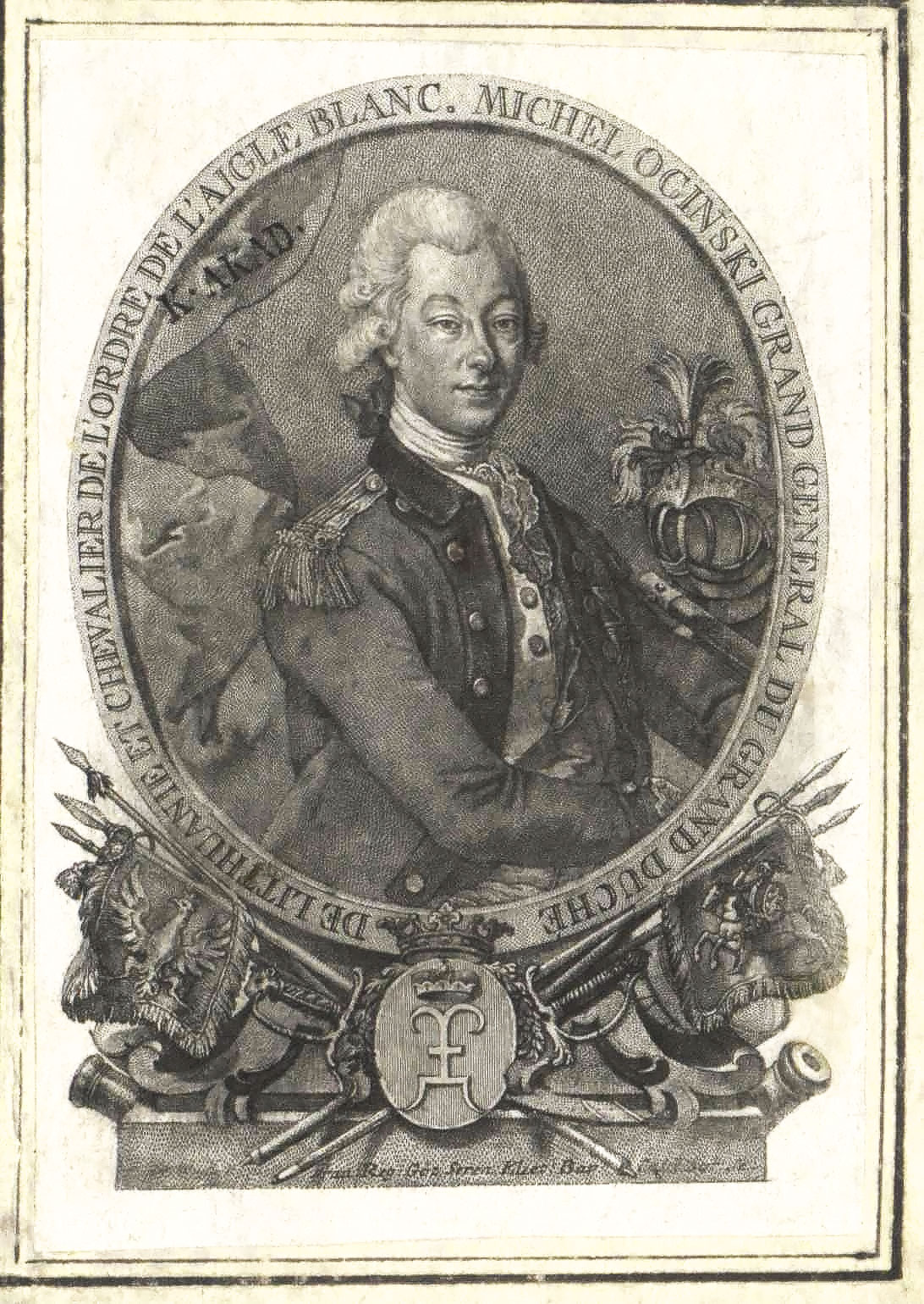 Беларуская (тарашкевіца): Партрэт Міхала Казімера Агінскага (Michał Kazimier Aginski).